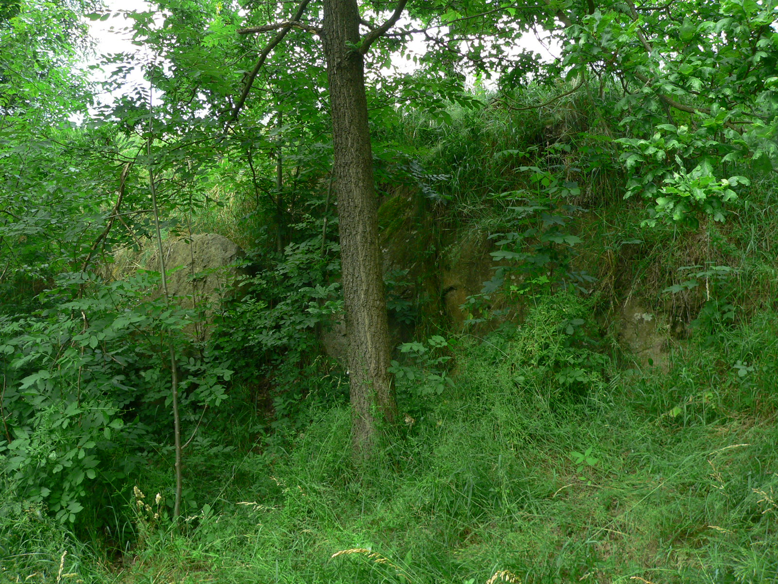 Ortsansichten von Fattigau, die den Standort des ehemaligen kleinen Eklogit-Steinbruchs erläutern